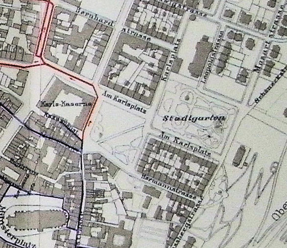 Amtliche Vorlage des Bauamts für den Stadtrat Freiburg Verlauf der vorhandenen und geplanten Bächle im Jahr 1905. Rot geplant, blau vorhanden.